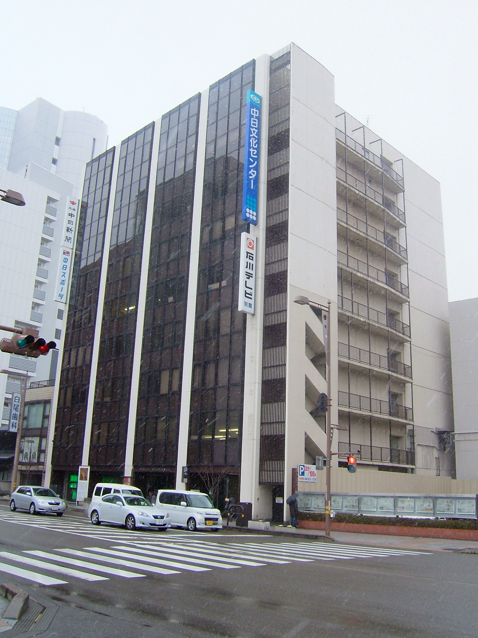 石川テレビ放送別館が入居する石川県金沢市の金沢中日ビル。2010年10月までは中日新聞社北陸本社も入居していた。